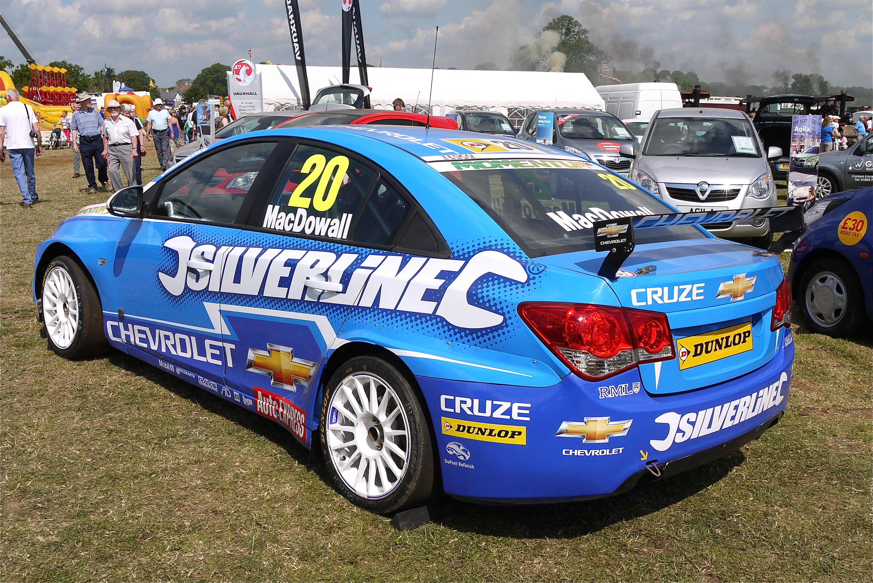 Panasonic G1 14-45 Lens iA mode